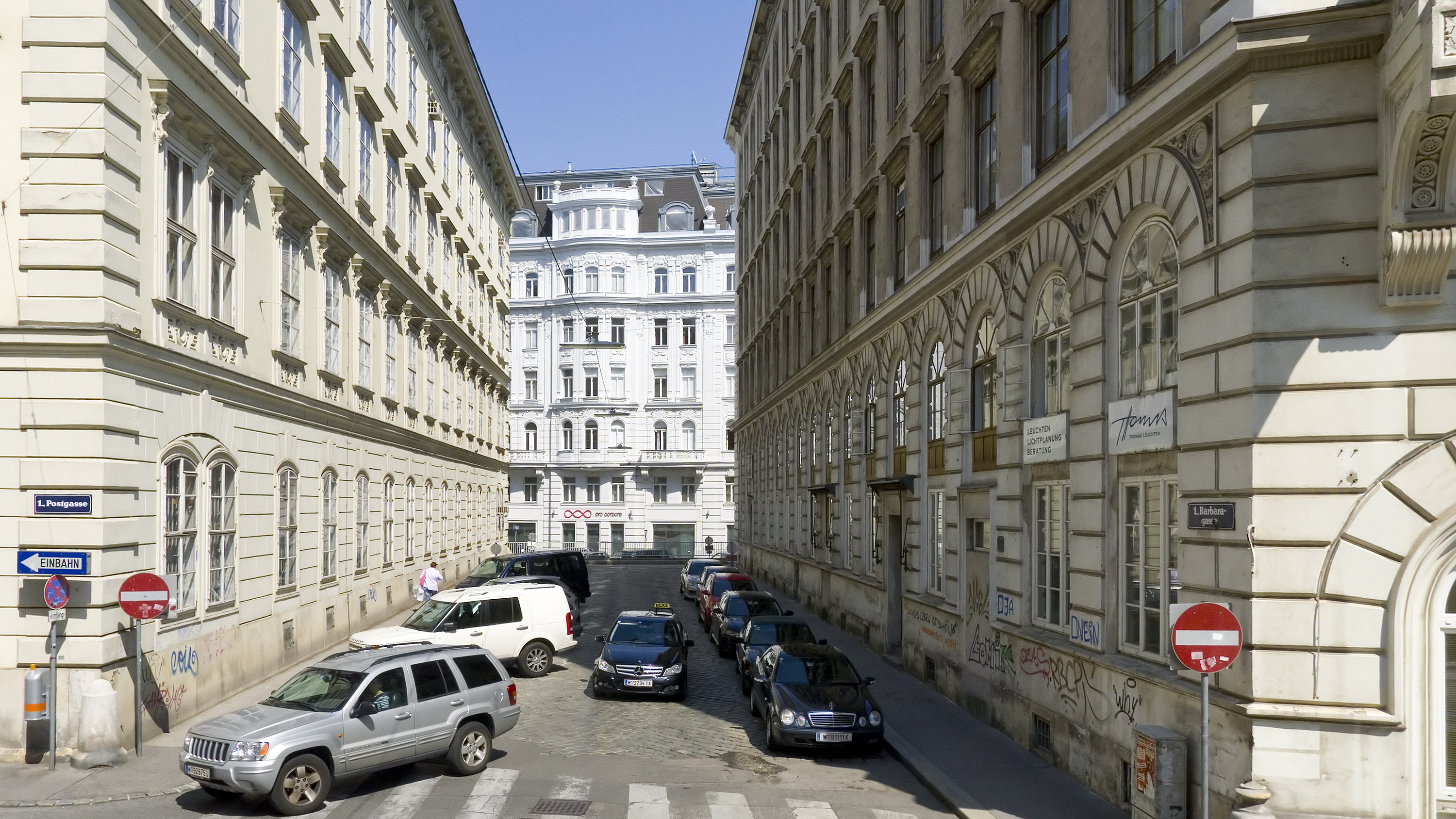 Barbaragasse in Wien 1 bei der Postgasse Richtung Osten